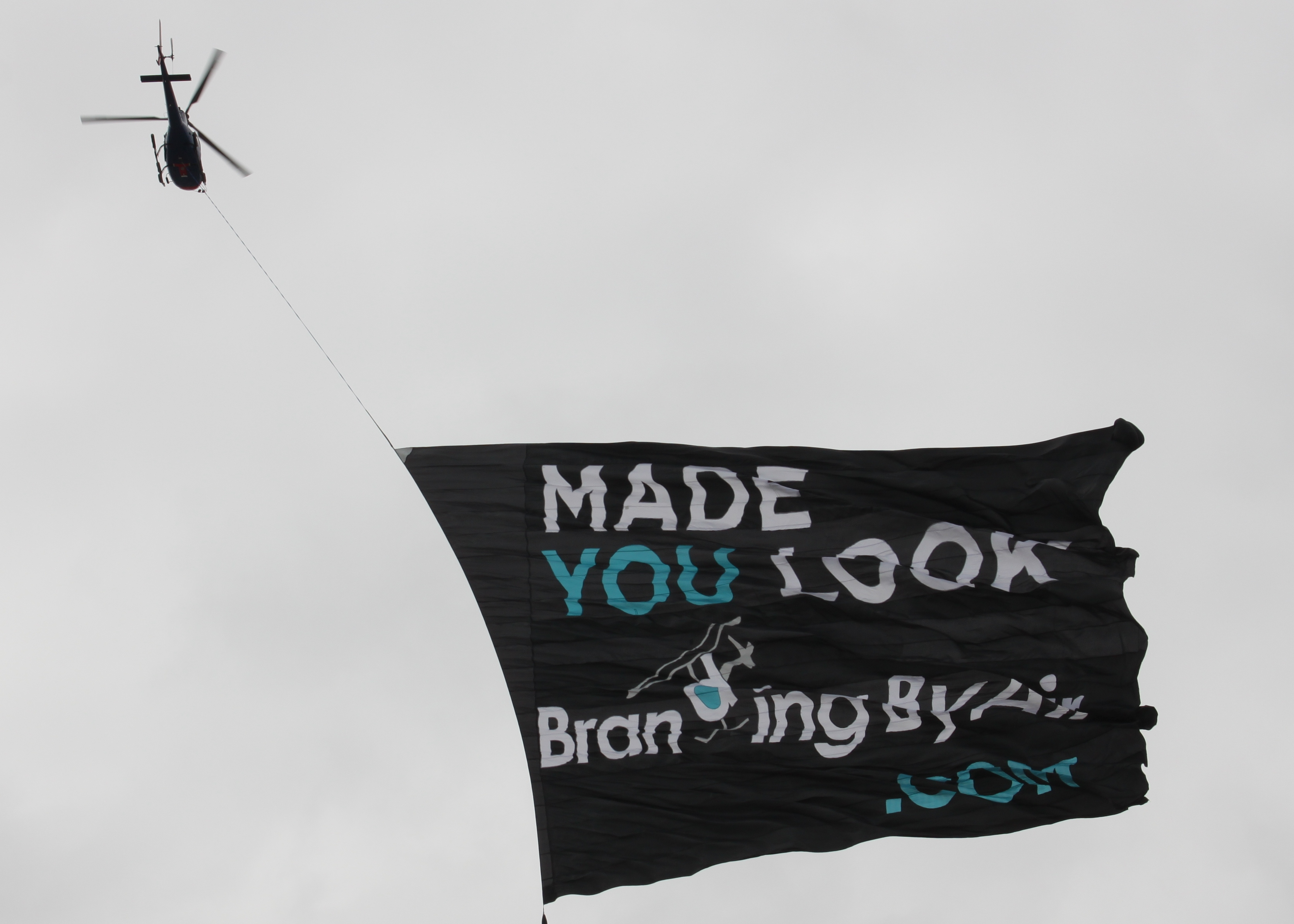 Helicopter Banner Tow